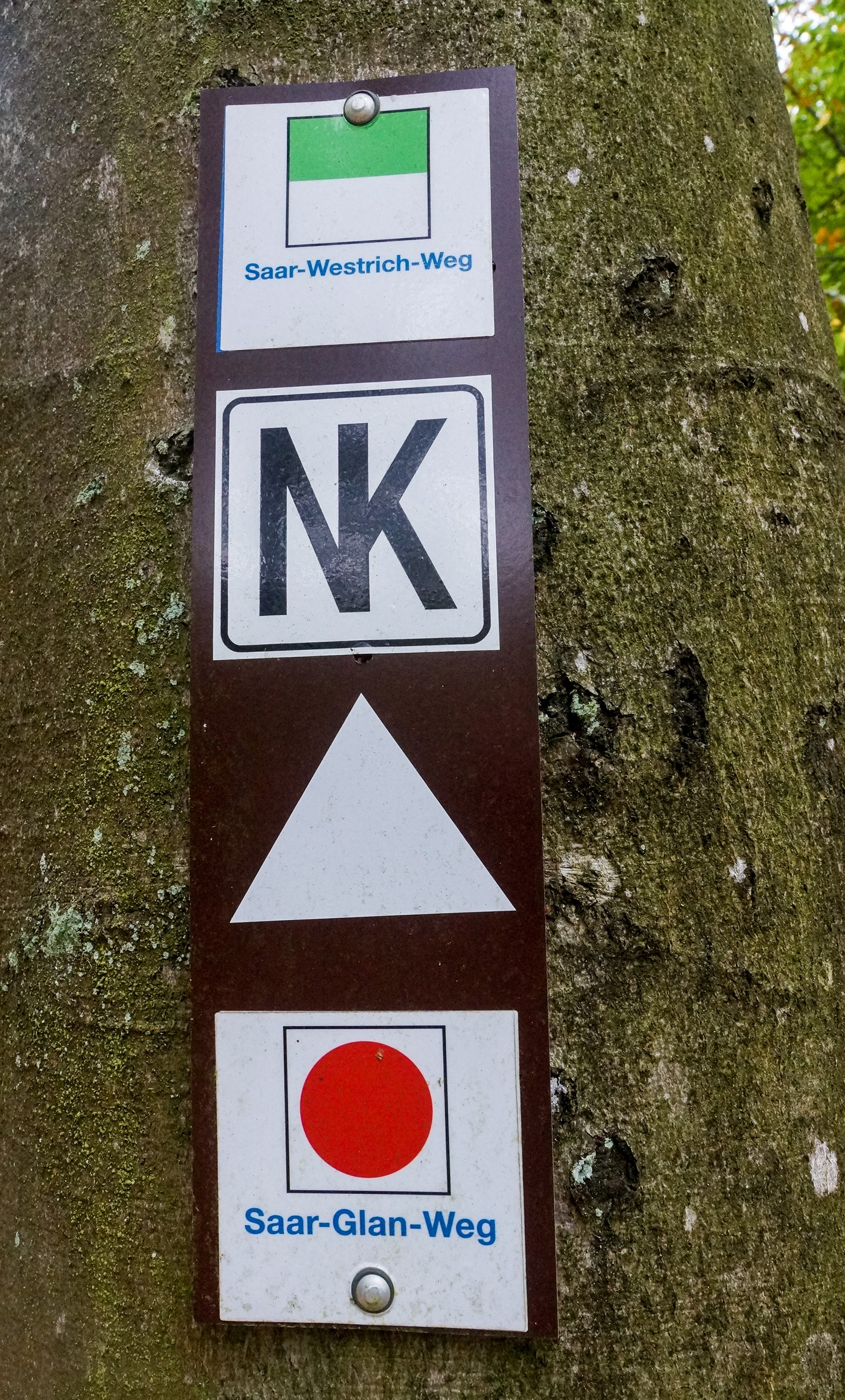 Wanderwege im Saarland. In der Nähe das Sportplatz Eberstein, Wiebelskirchen